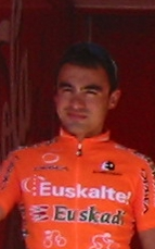 Euskaltel-Euskadi, Euskal Bizikleta 2005